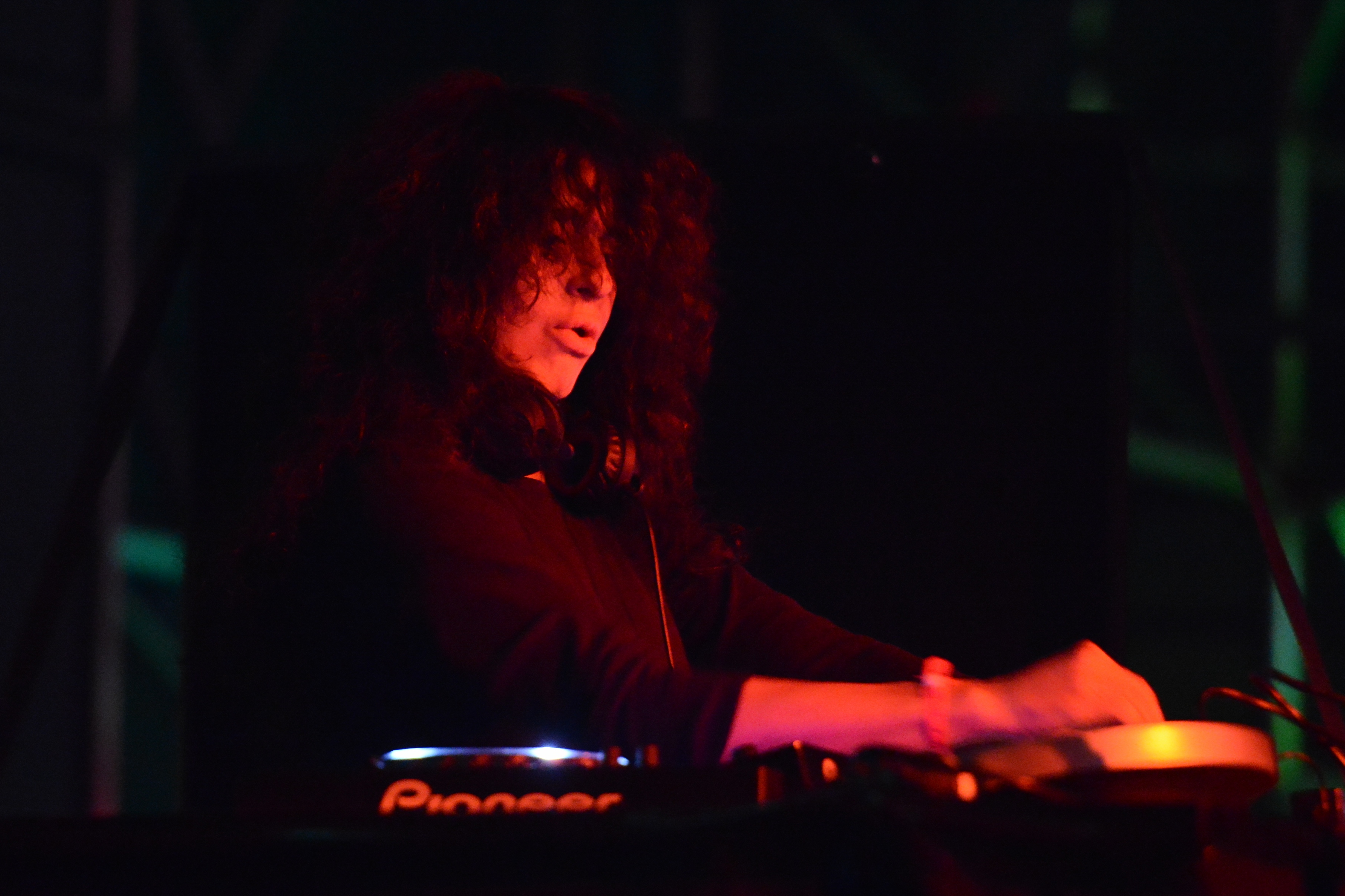 Nicole Moudaber bei Mayday 2014.